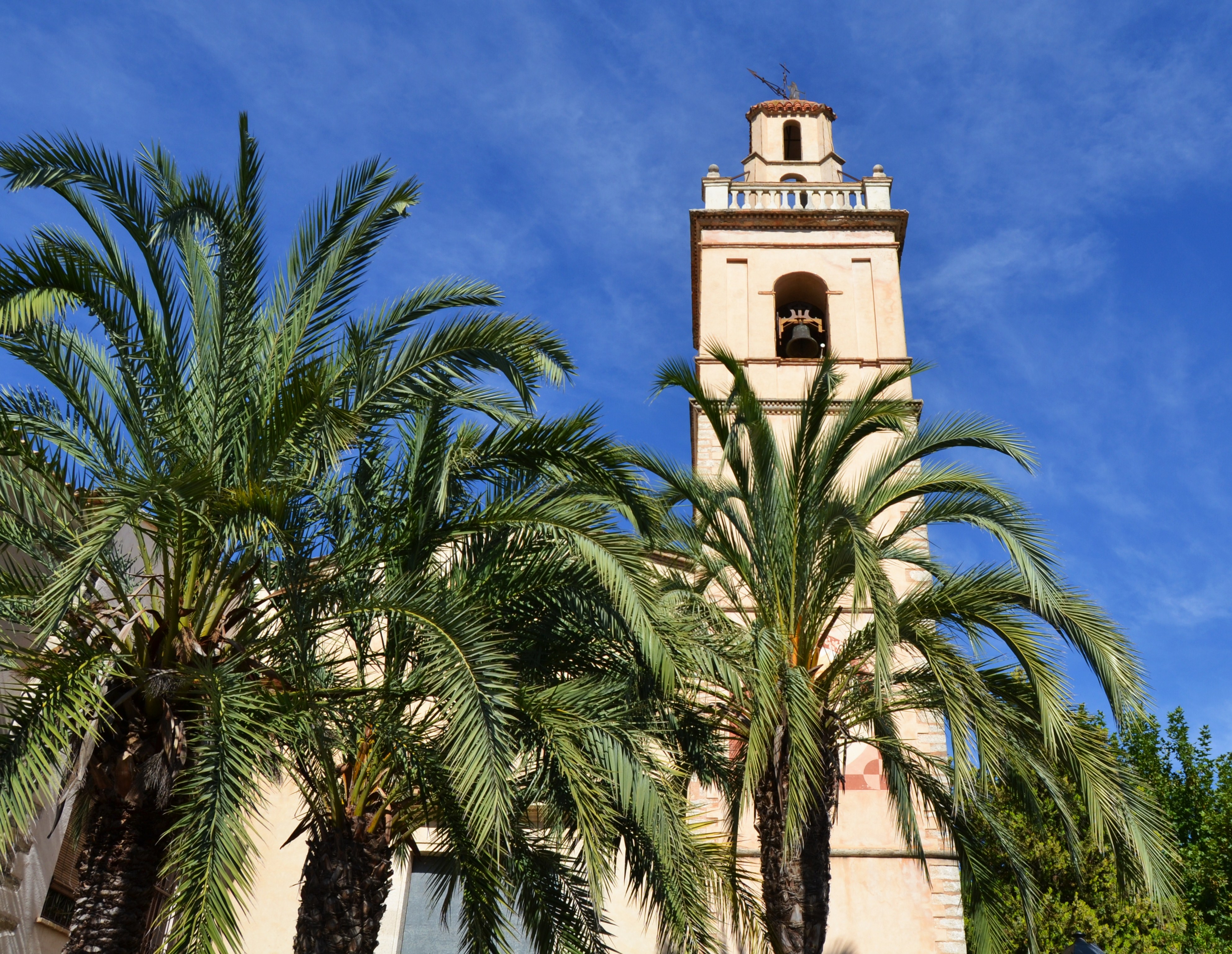 Església de la Mare de Déu del Roser de Benillup i palmeres.